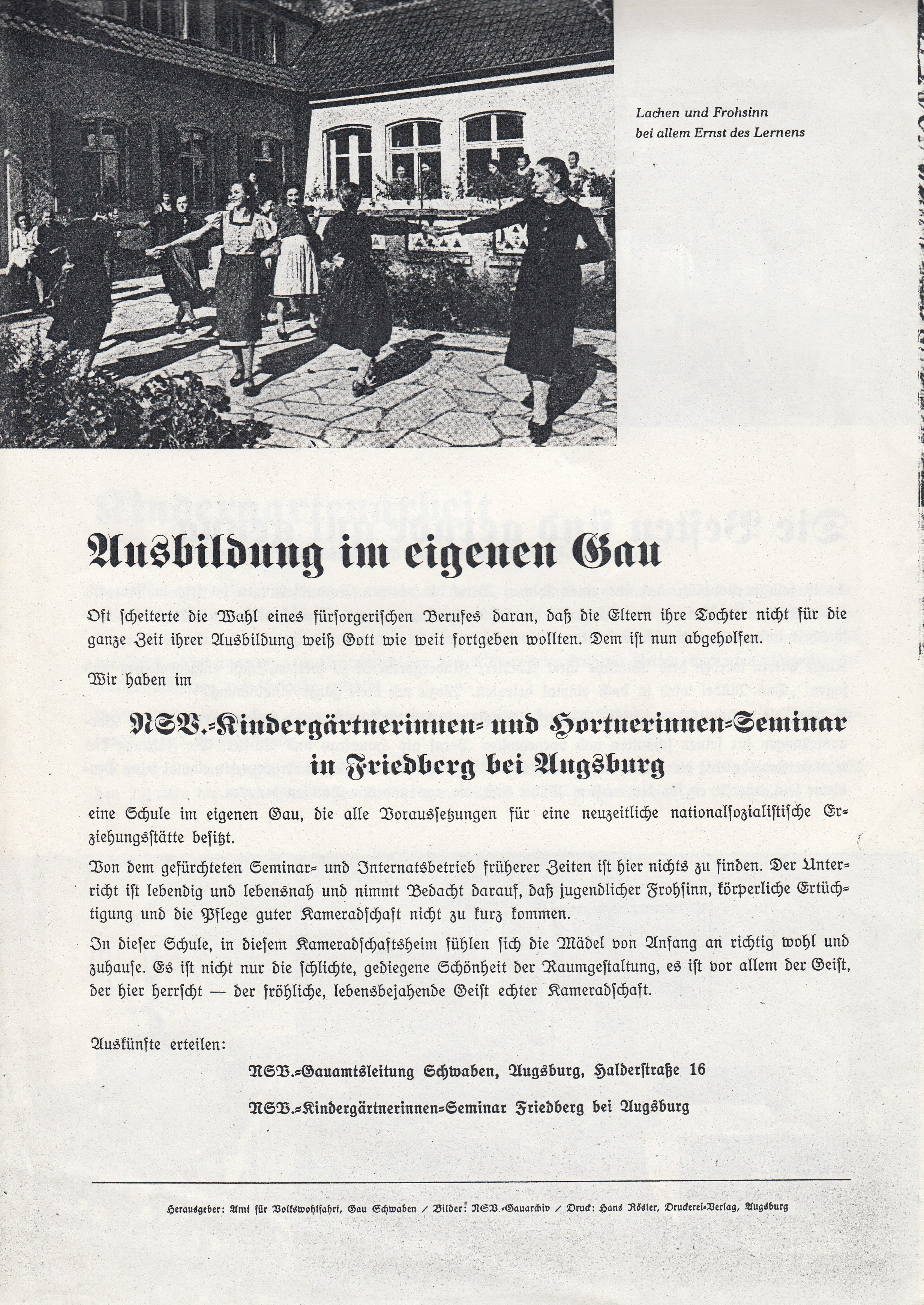 Rückseite Prospekt NSV.-Seminar Friedberg